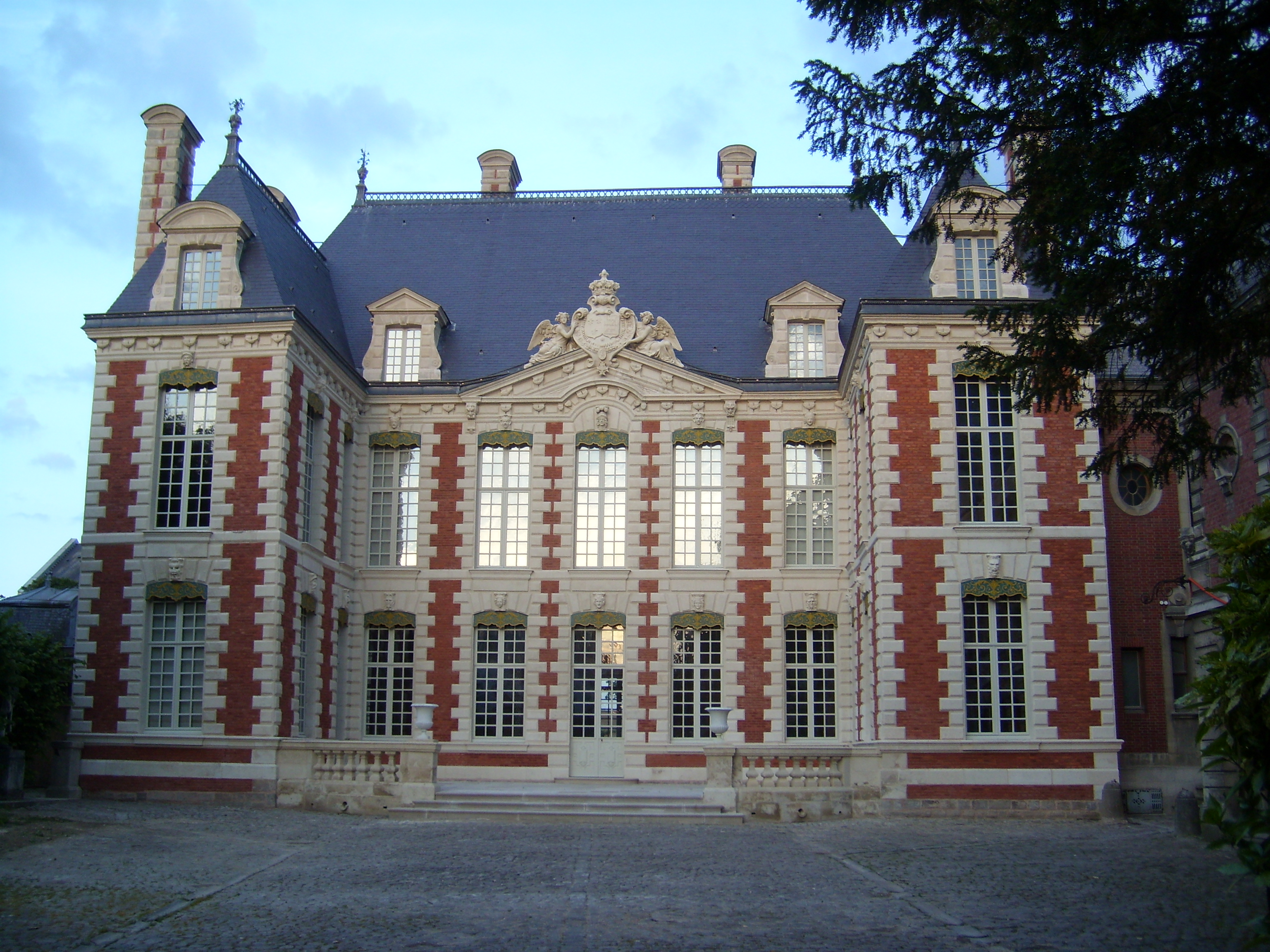 Amiens - Hôtel de Berny. This building is en partie classé, en partie inscrit au titre des Monuments Historiques. .